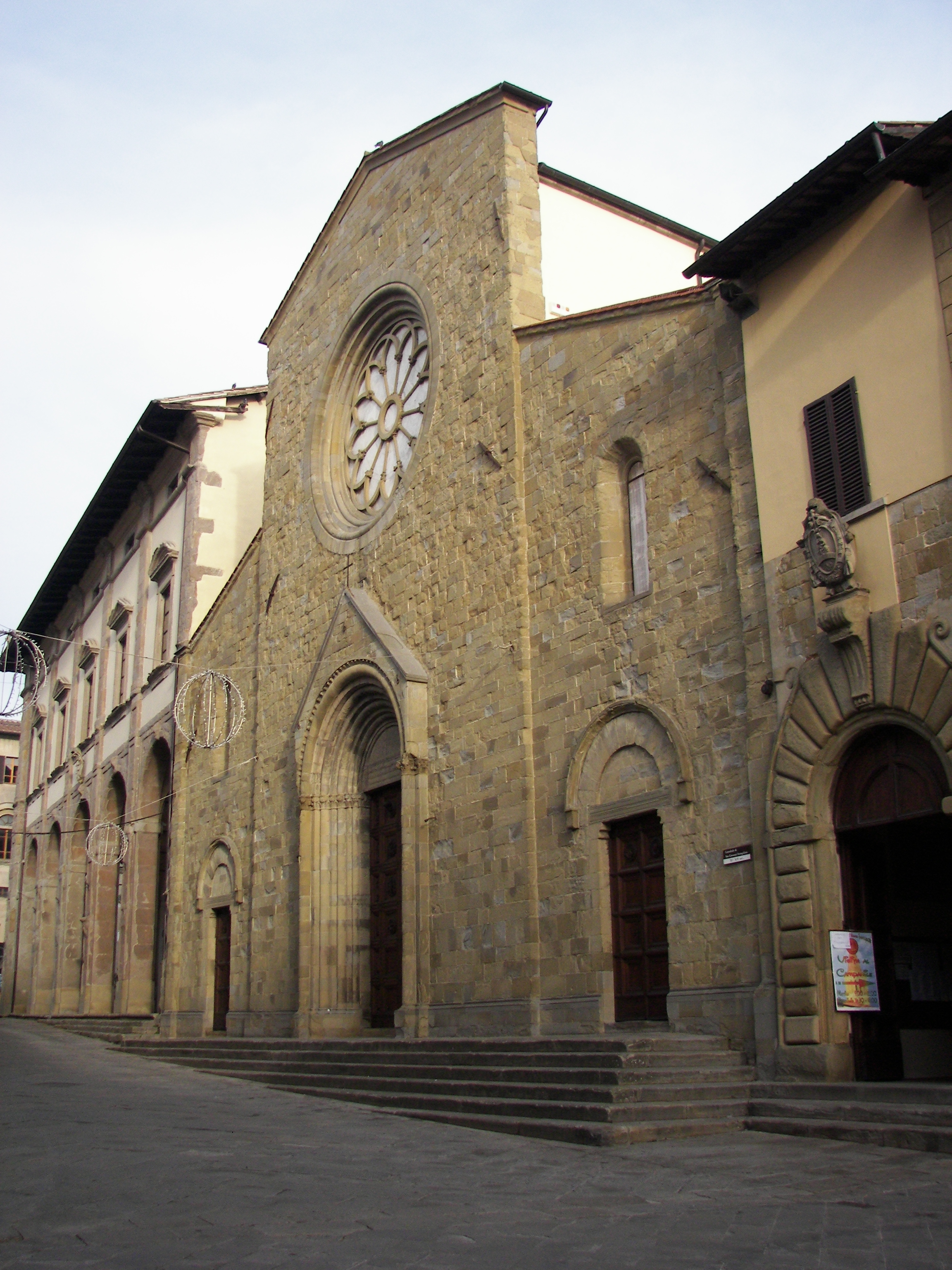 San Sepolcro (AR)